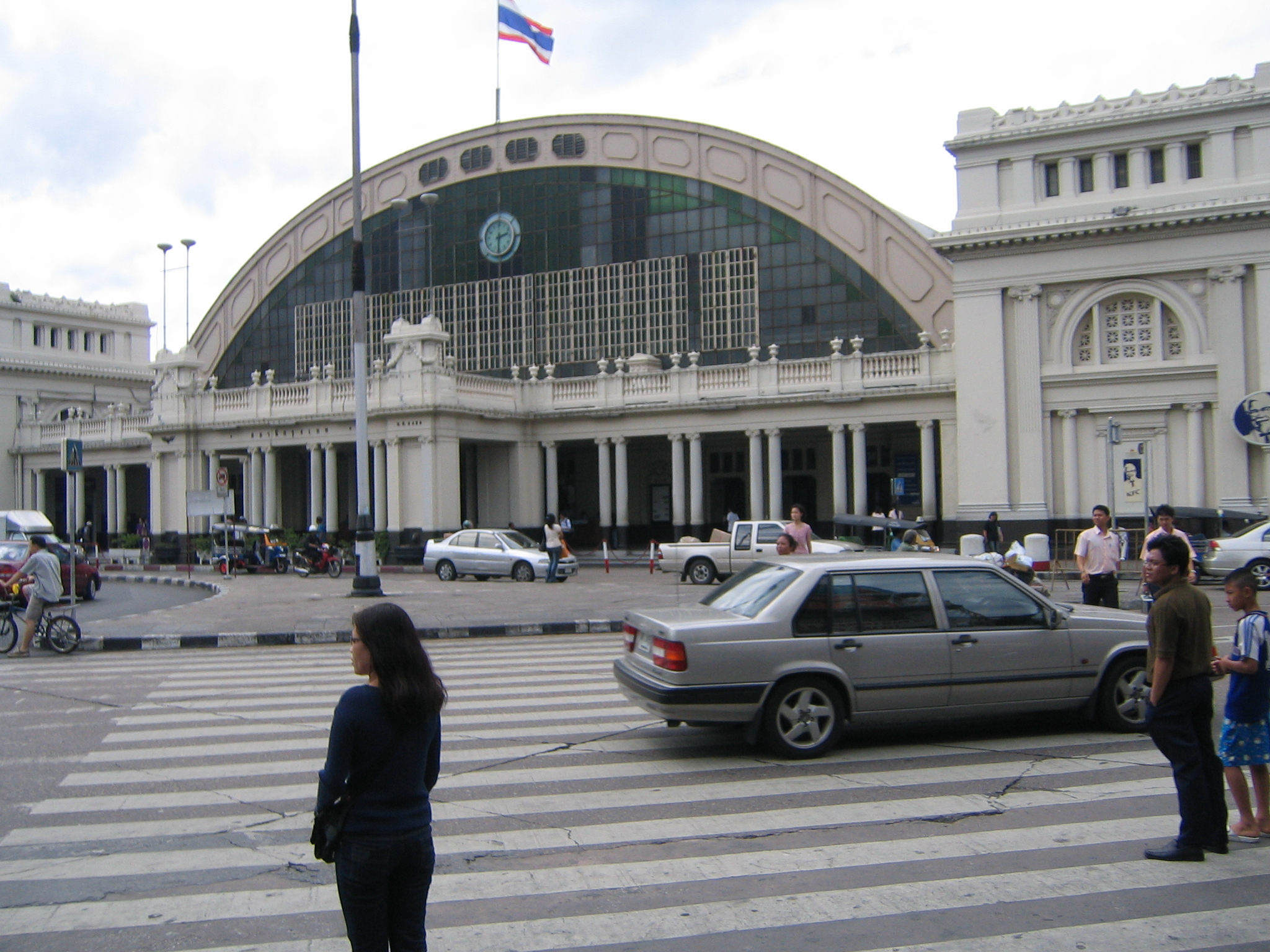 Bangkok Main Railway Station Hua Lamphong